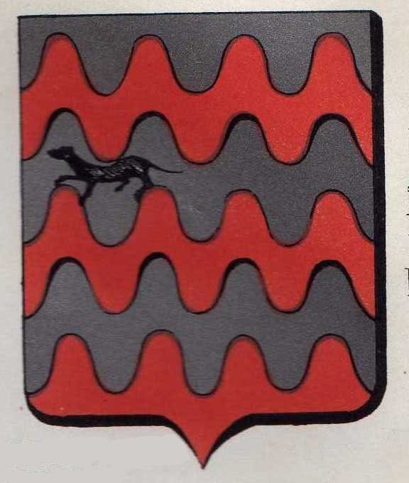 Blason des Seigneurs de Mortemart. Fascé ondé et enté d'argent et de gueules de six pièces qui est de Rochechouart, chargé sur le deuxième fasce d'une belette de sable pour brisure des premiers degrés.